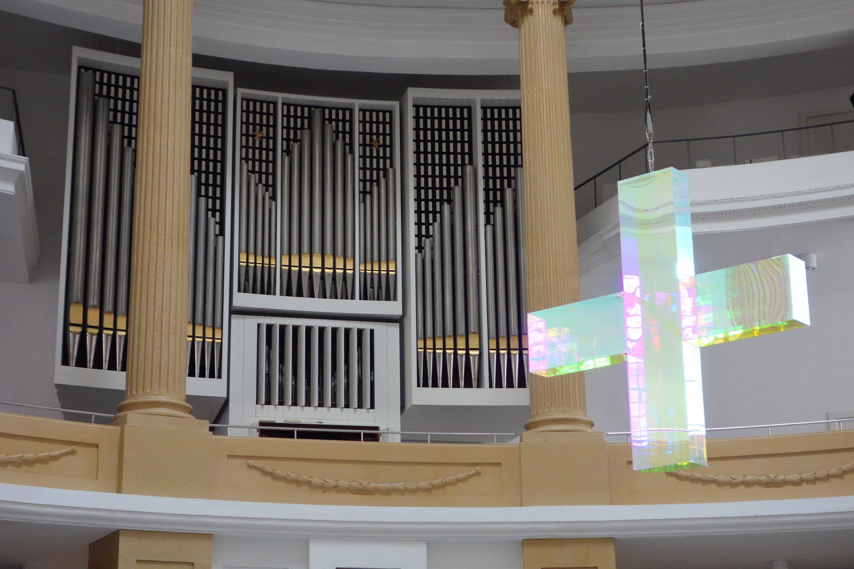 Orgel der Lambertikirche Oldenburg, Niedersachsen, Deutschland